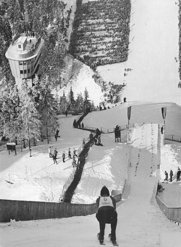 Zentralbild Kohls 23.2.1964 XV. Nordische Skimeisterschaften in Oberhof Blick vom Schanzenturm auf die über 40.000 Zuschauer während des zweiten Durchgangs der Deutschen Meisterschafte der Spezialspringer auf der neuen "Schanze am Rennsteig" am 23.2.1964 im Kanzlergrund bei Oberhof.